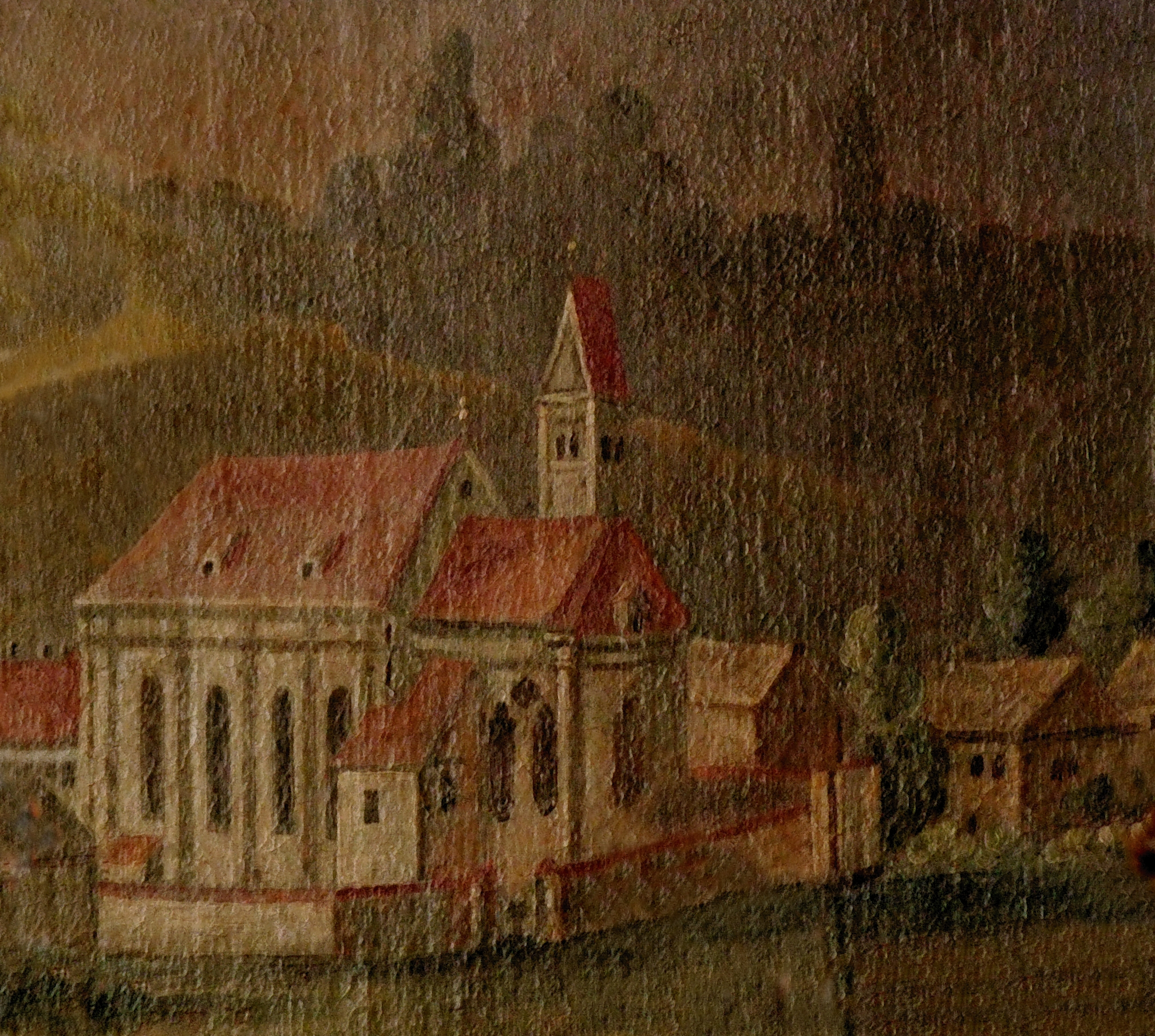 St. Magnus in Unterrammingen in Oberschwaben (Detail des Hochaltarbildes mit der neuerbauten Kirche mit dem bis 1796 bestehenden Turmabschluss)